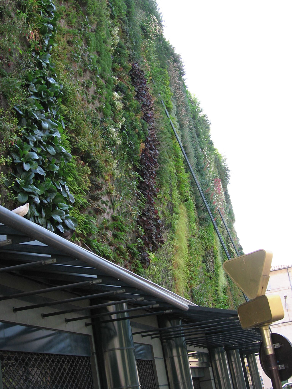 Mur végétal de 600m² installé sur la facade des Halles à Avignon (place Pie) conçu par le botaniste Patrick Blanc. Photo personnelle, diffusion illimitée. Juillet 2006